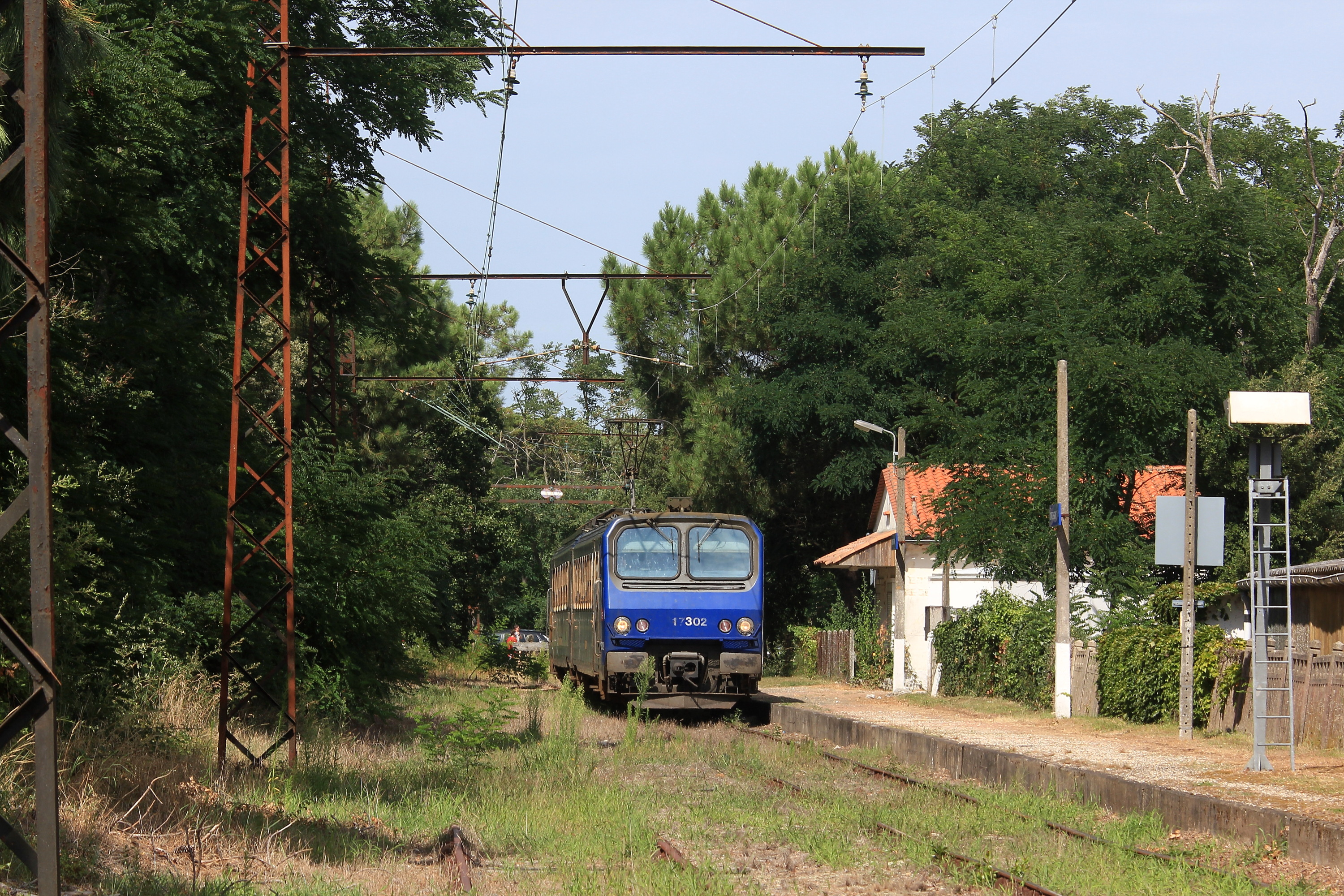 La Z 7302 au terminus de La Pointe-de-Grave.